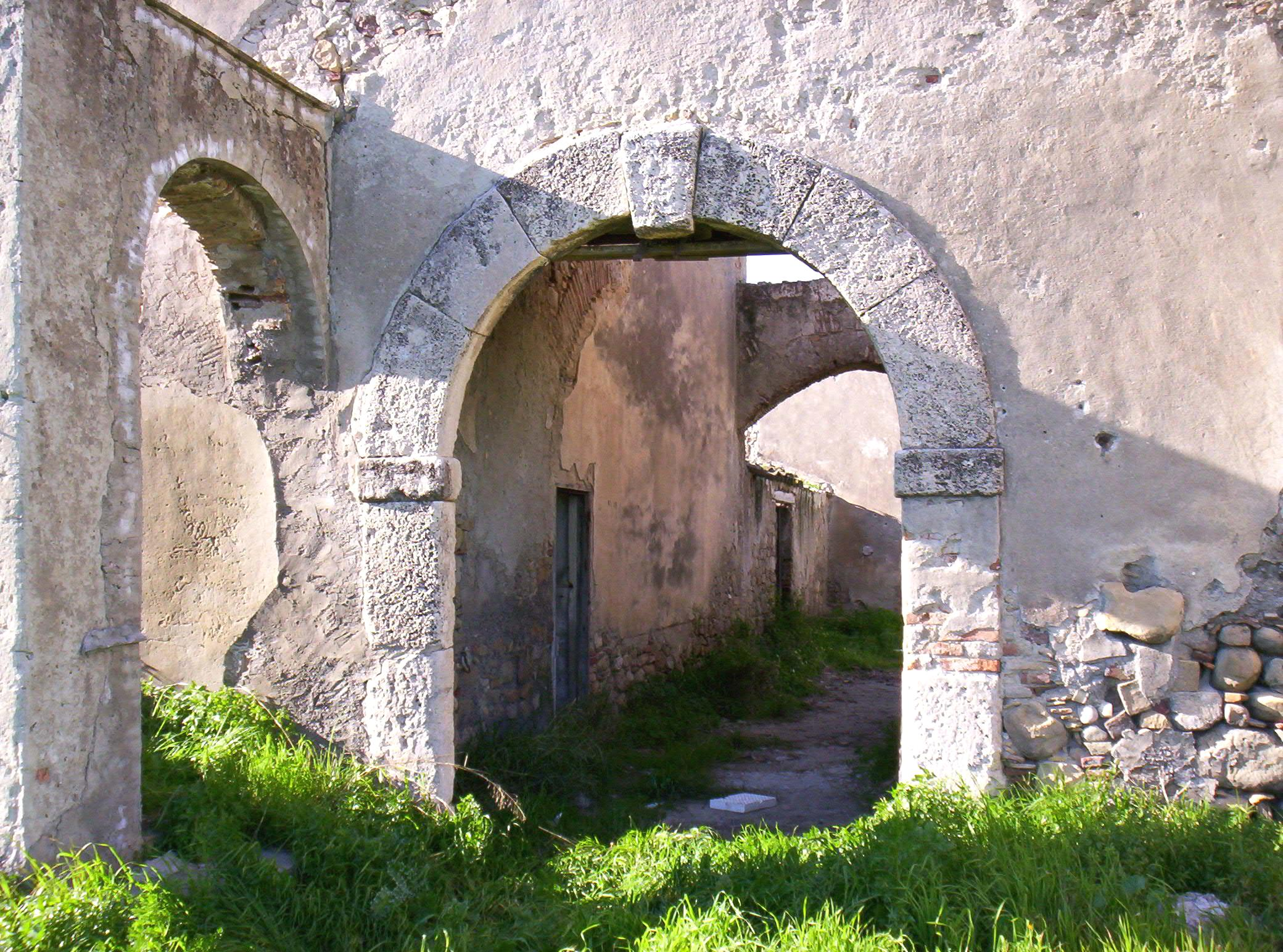 Autore e Fonte: Nicolò Fiorenza; Descrizione: ingresso principale del Fondaco Cuba Catenanuova; Licenza d'uso